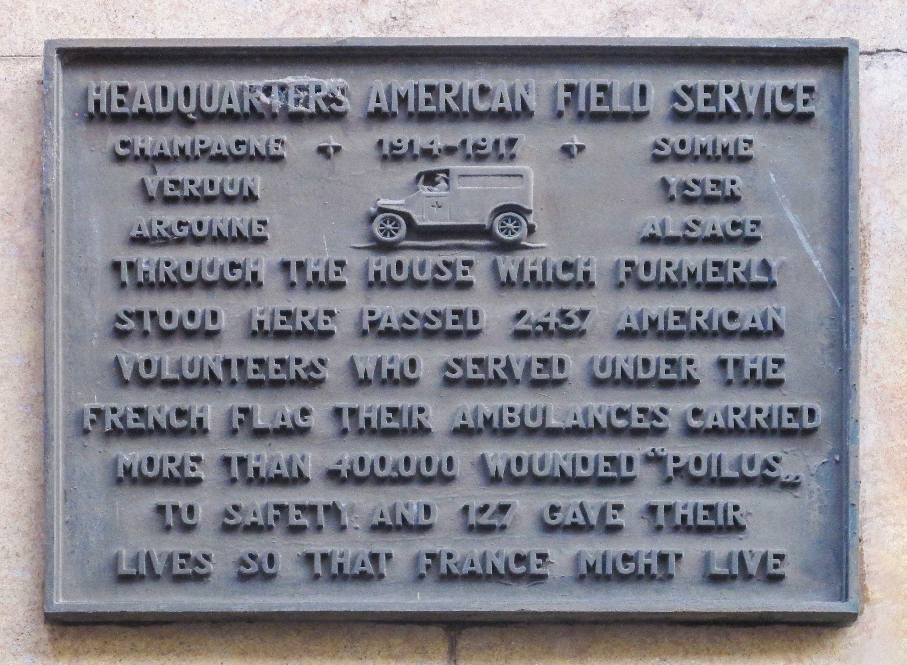 Plaque rendant hommage à l'American Field Service, 21 rue Raynouard (Paris, 16e). Transcription : "Champagne, Verdun, Argonne. 1914-1917. Somme, Yser, Alsace. Through the house which formerly stood here passed 2437 American volunteers who served under the French flag their ambulances carried more than 400 000 wounded "Poilus" to safety and 127 gave their lives so that France might live".